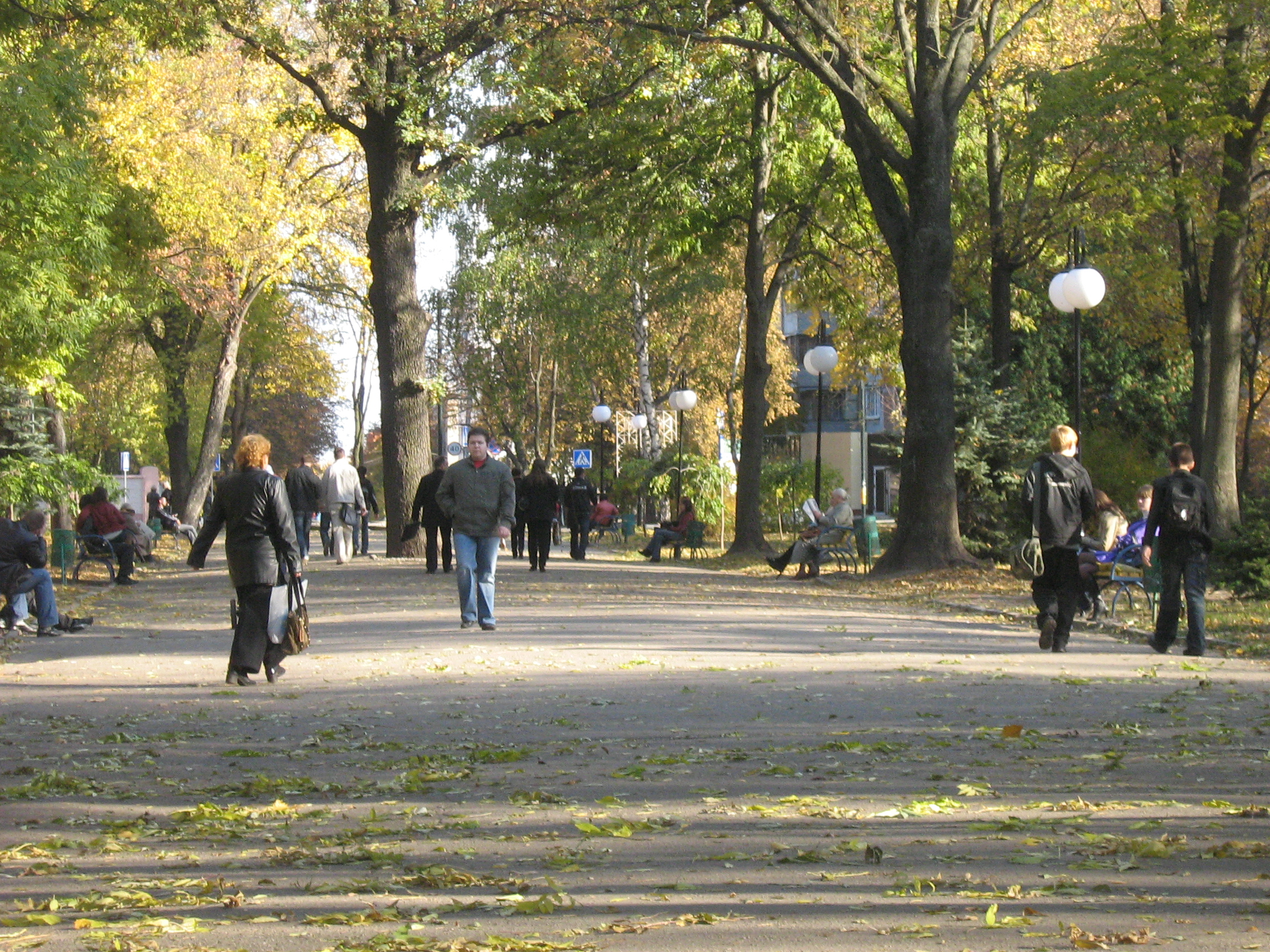 Середина осени в Харькове. Молодежный парк.